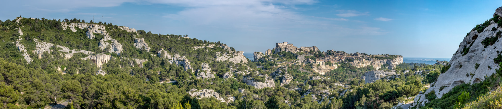 500px provided description: Panorama Les baux de provence [#landscape ,#sunset ,#rock ,#tree ,#wood ,#france ,#canon ,#castle ,#pierre ,#mountain ,#gorgeous ,#tamron ,#arbre]